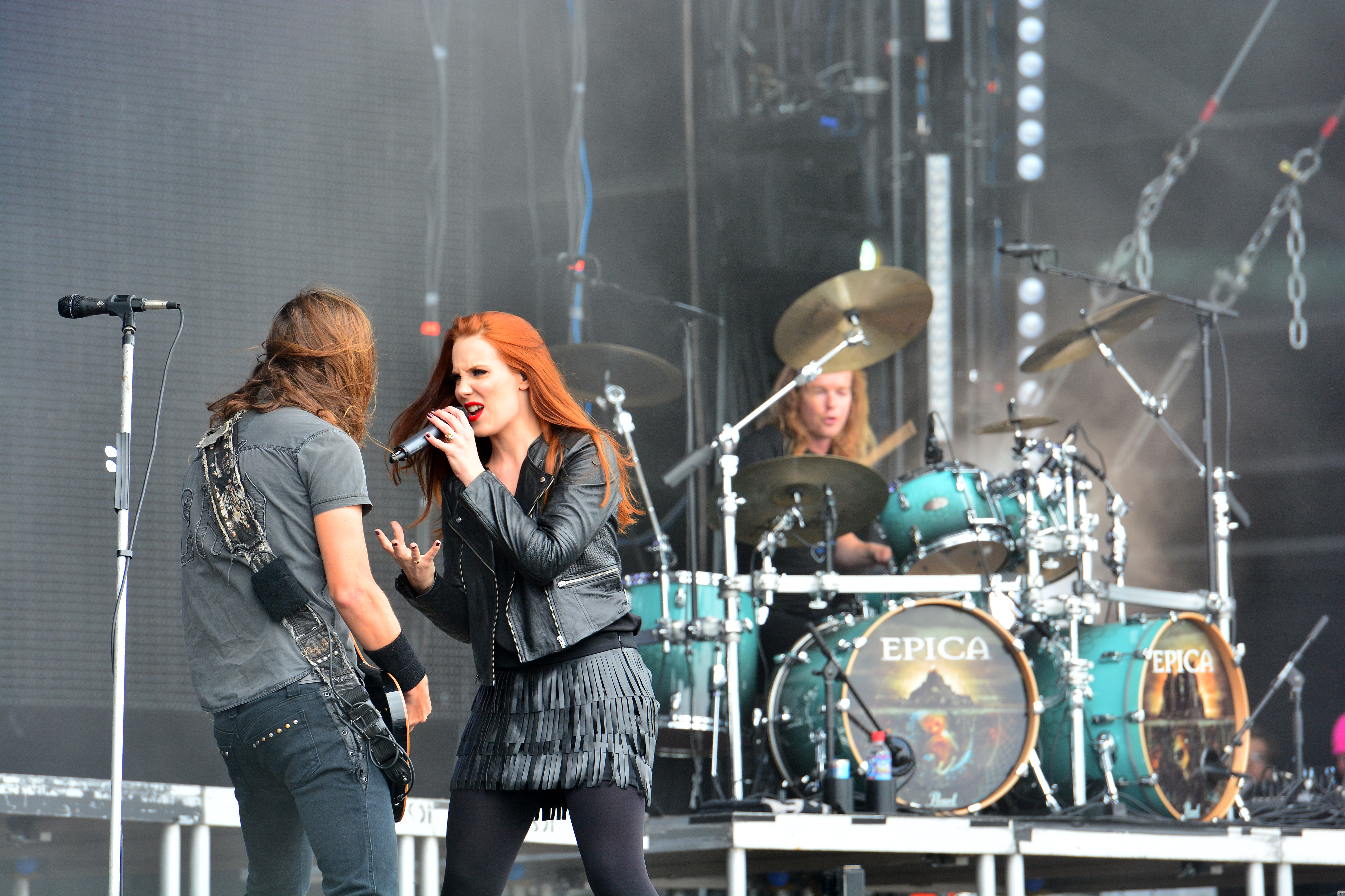 Epica beim Wacken Open Air 2015